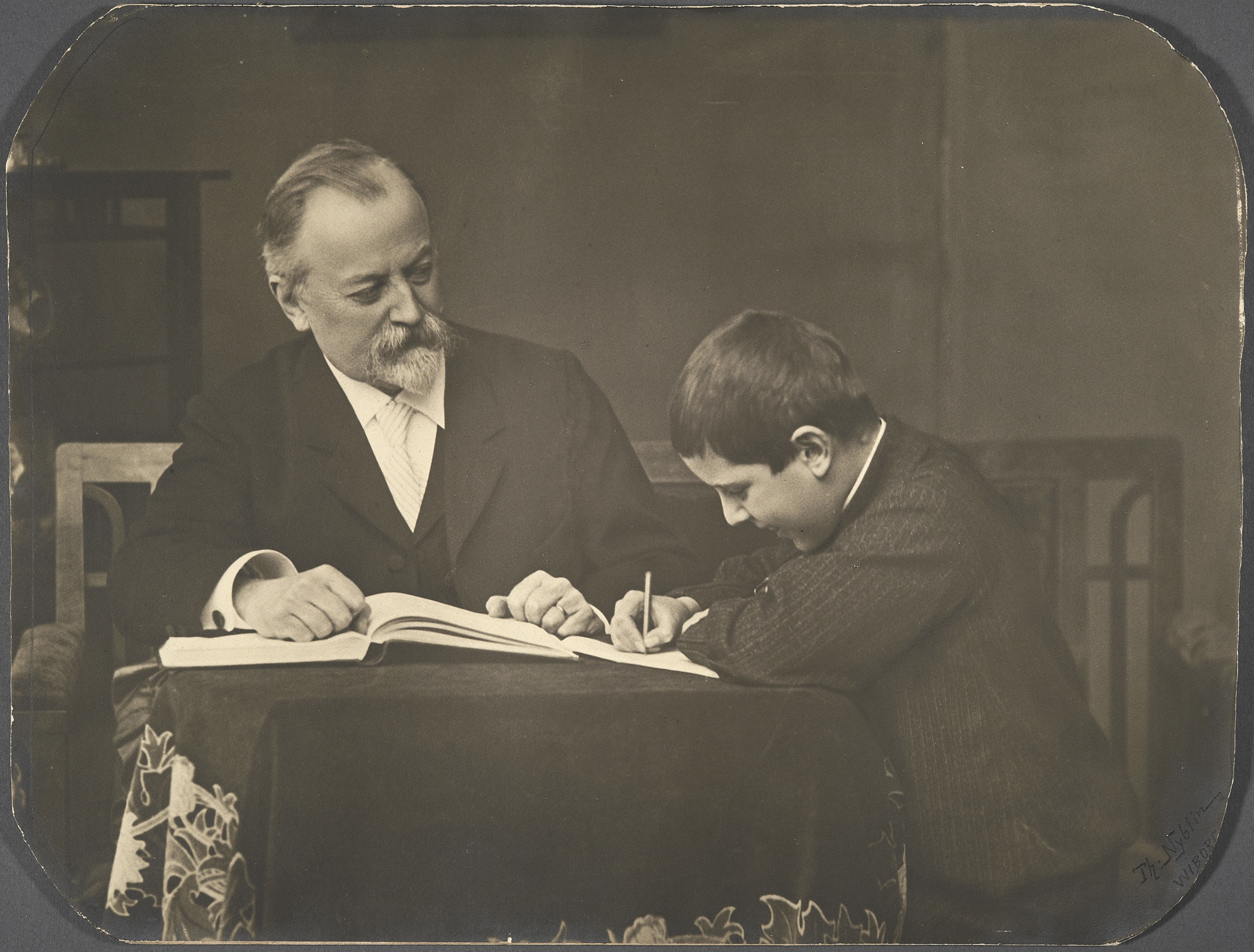 торговый советник Вильгельм Хэкман с внуком Берндтом Робертом АФ Фростерусом